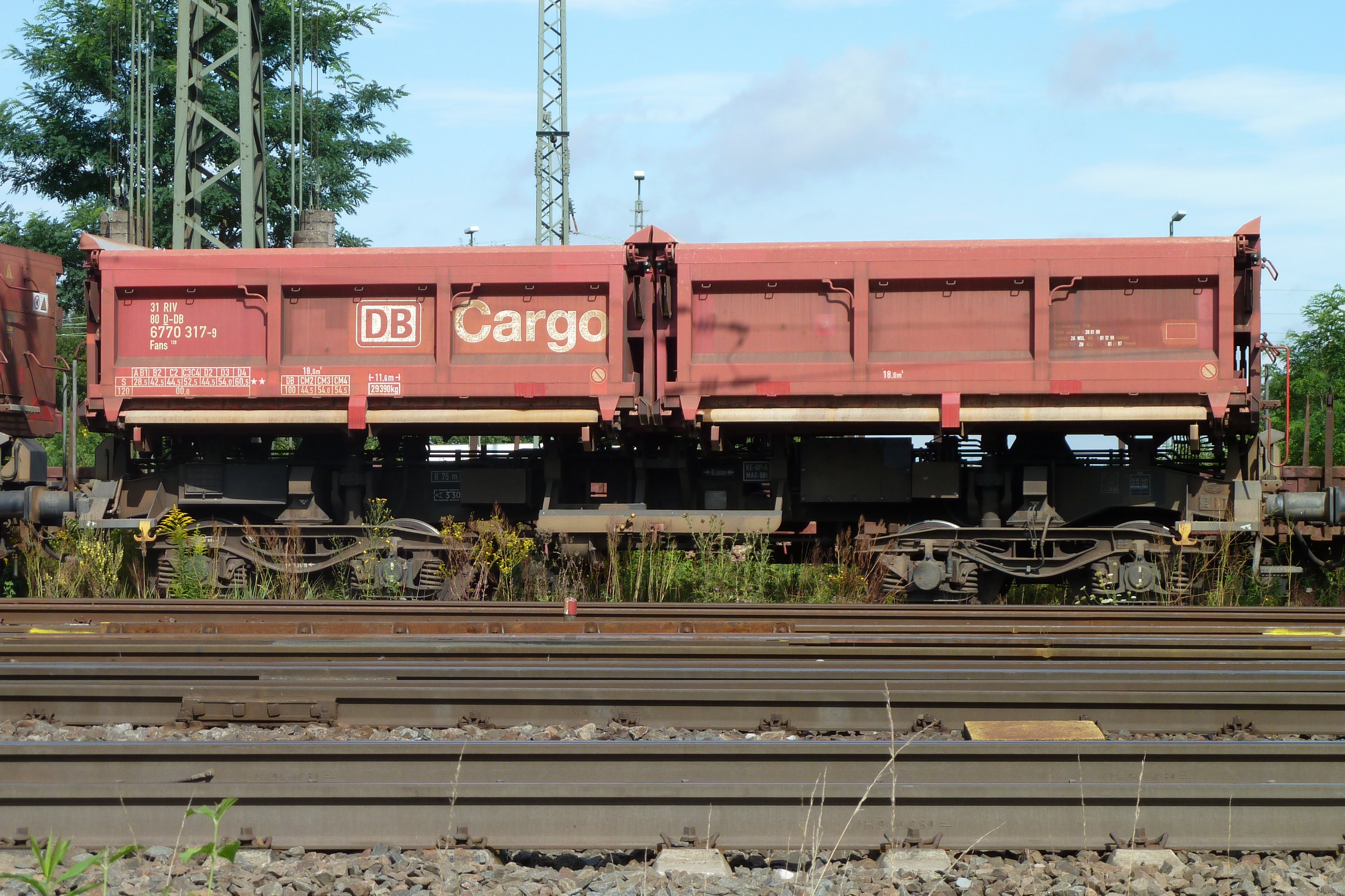 Güterwagen Gattung F offener Schüttgutwagen Fans 128